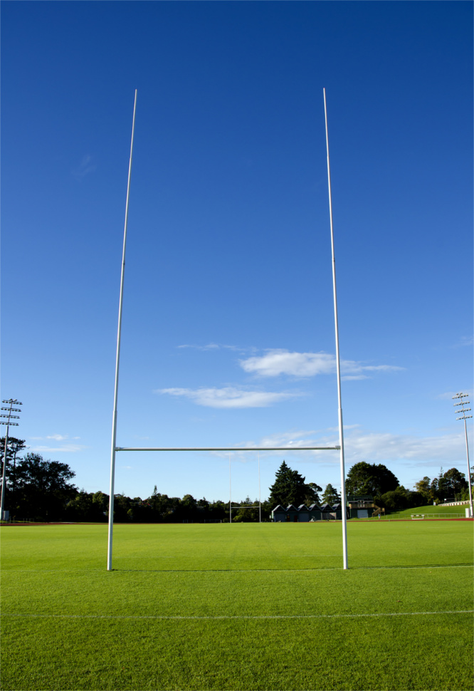 Το τέρμα του ράγκμπι πάνω στο try-line